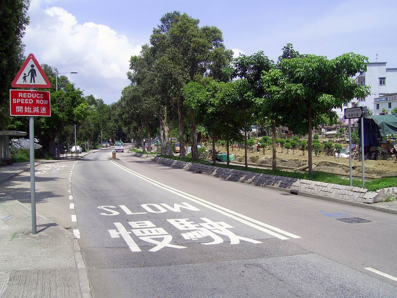 林村谷一段平坦的林錦公路